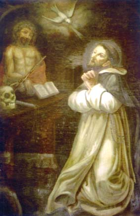 Foto del quadro del Beato Domenico Spadafora